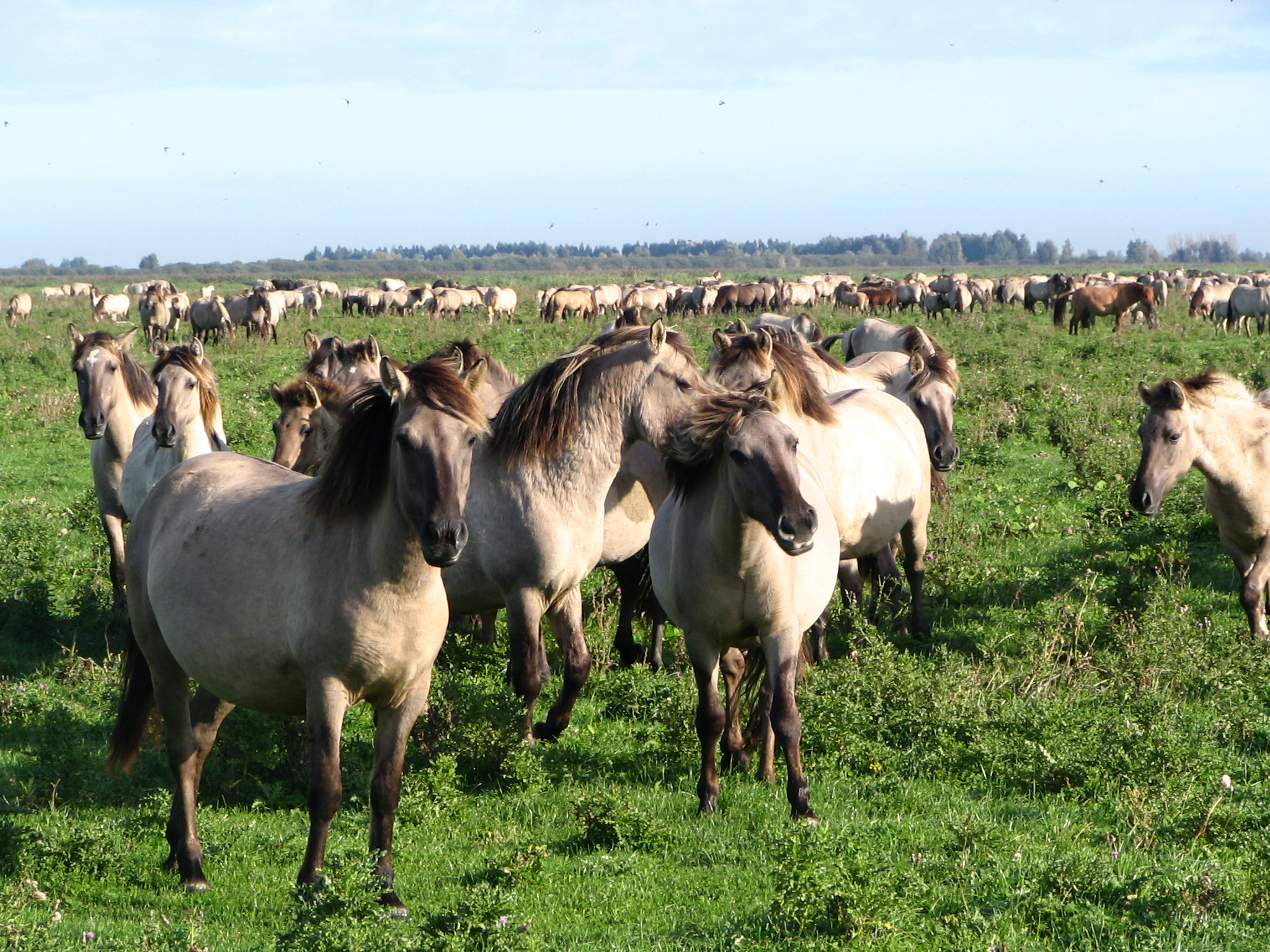 Eigen opname. GerardM